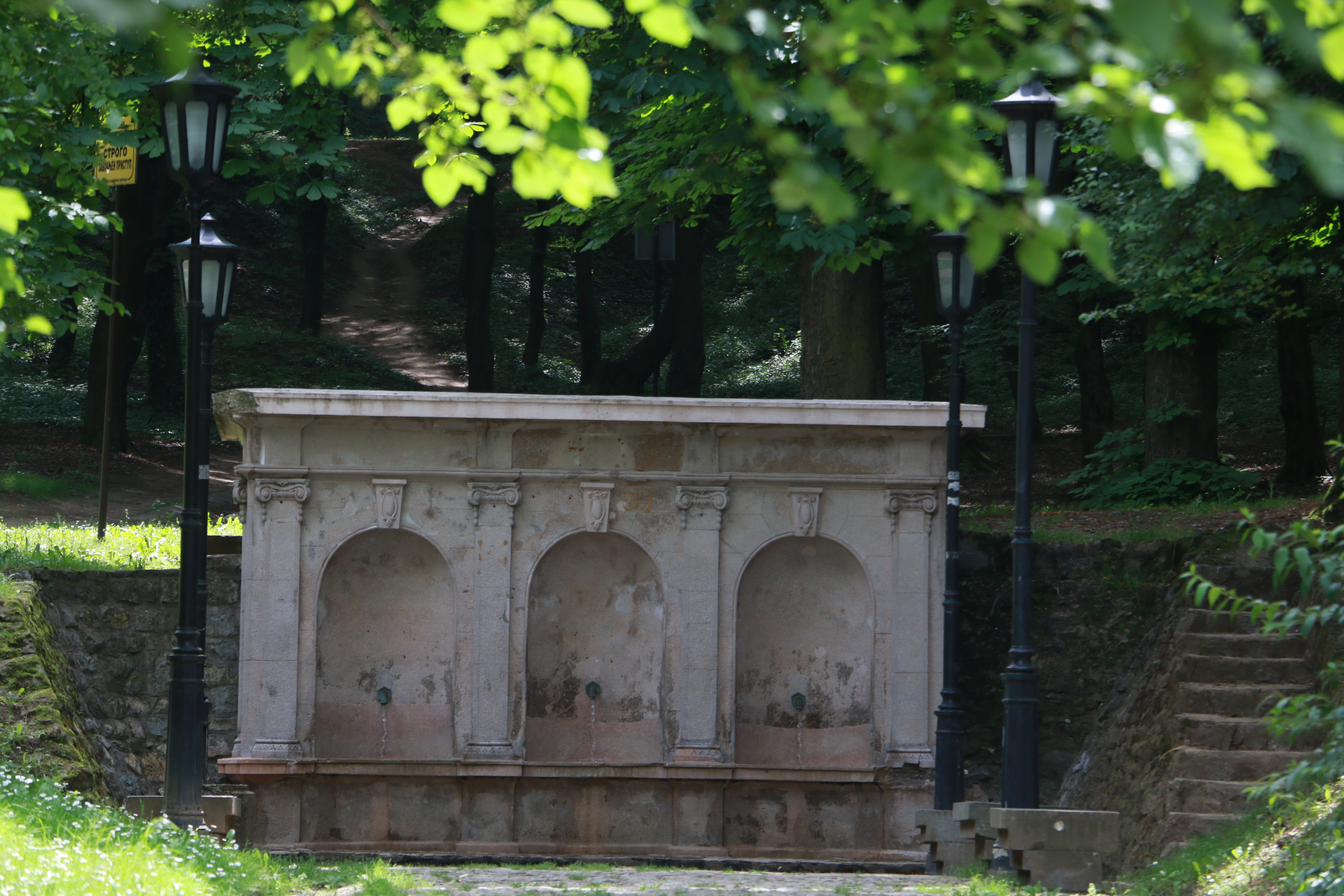 Ово је фотографија заштићеног природног добра у Србији под шифром: РП02 This is a a photo of a natural area in Serbia with ID: РП02 Strogi rezervat prirode Šuma hrasta lužnjaka i graba kod Hajdučke česme